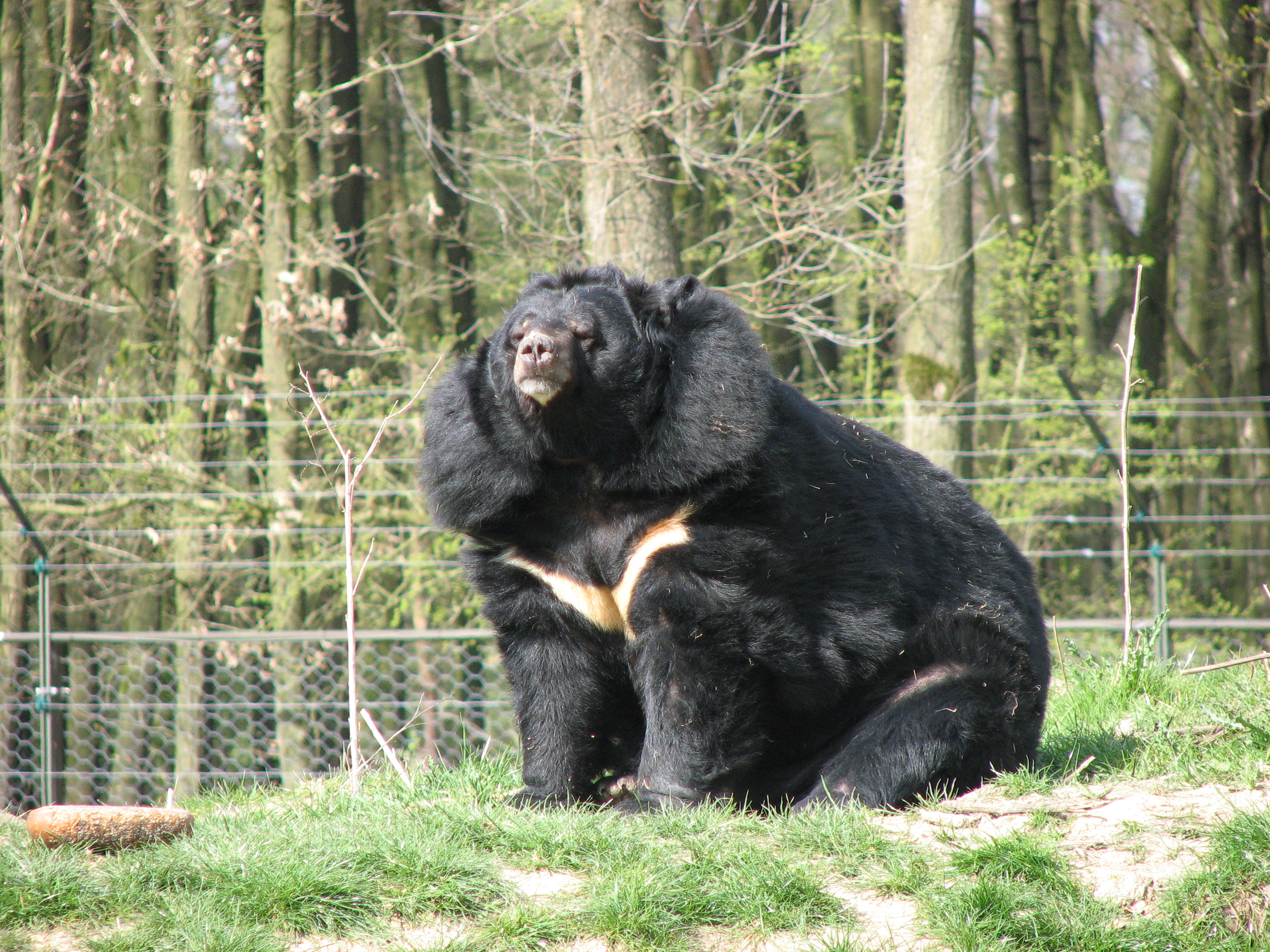 Kragenbär in der Anholter Schweiz